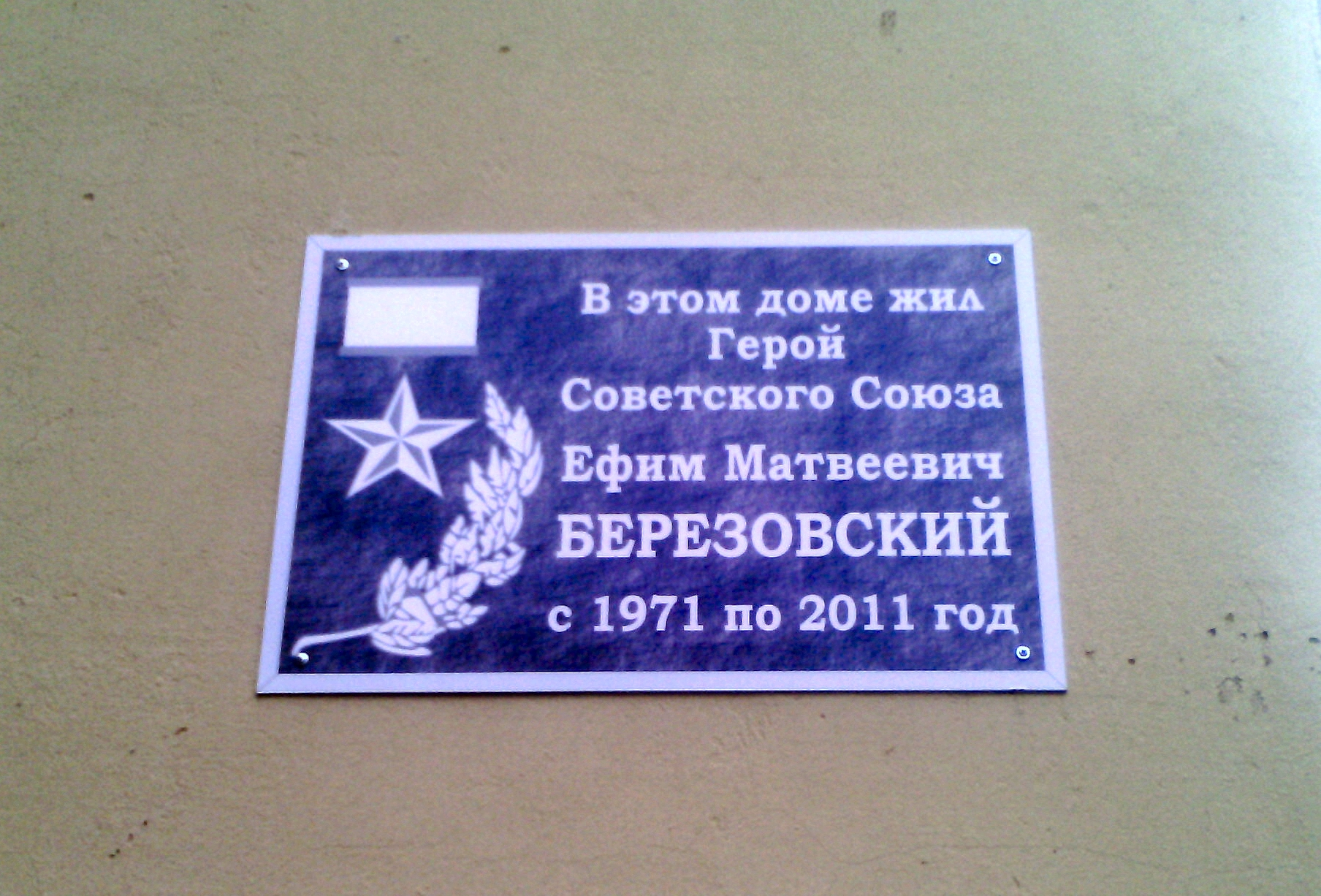 Памятная табличка Ефиму Матвеевичу Березовскому на доме 143 по Палехской улице (Москва)